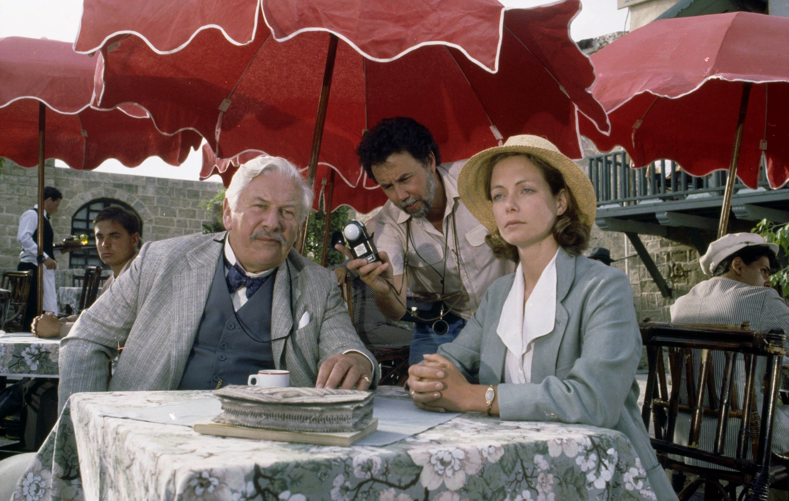 פיטר יוסטינוב, דוד גורפינקל , וג׳ני סיגרוב - מפגש עם המוות